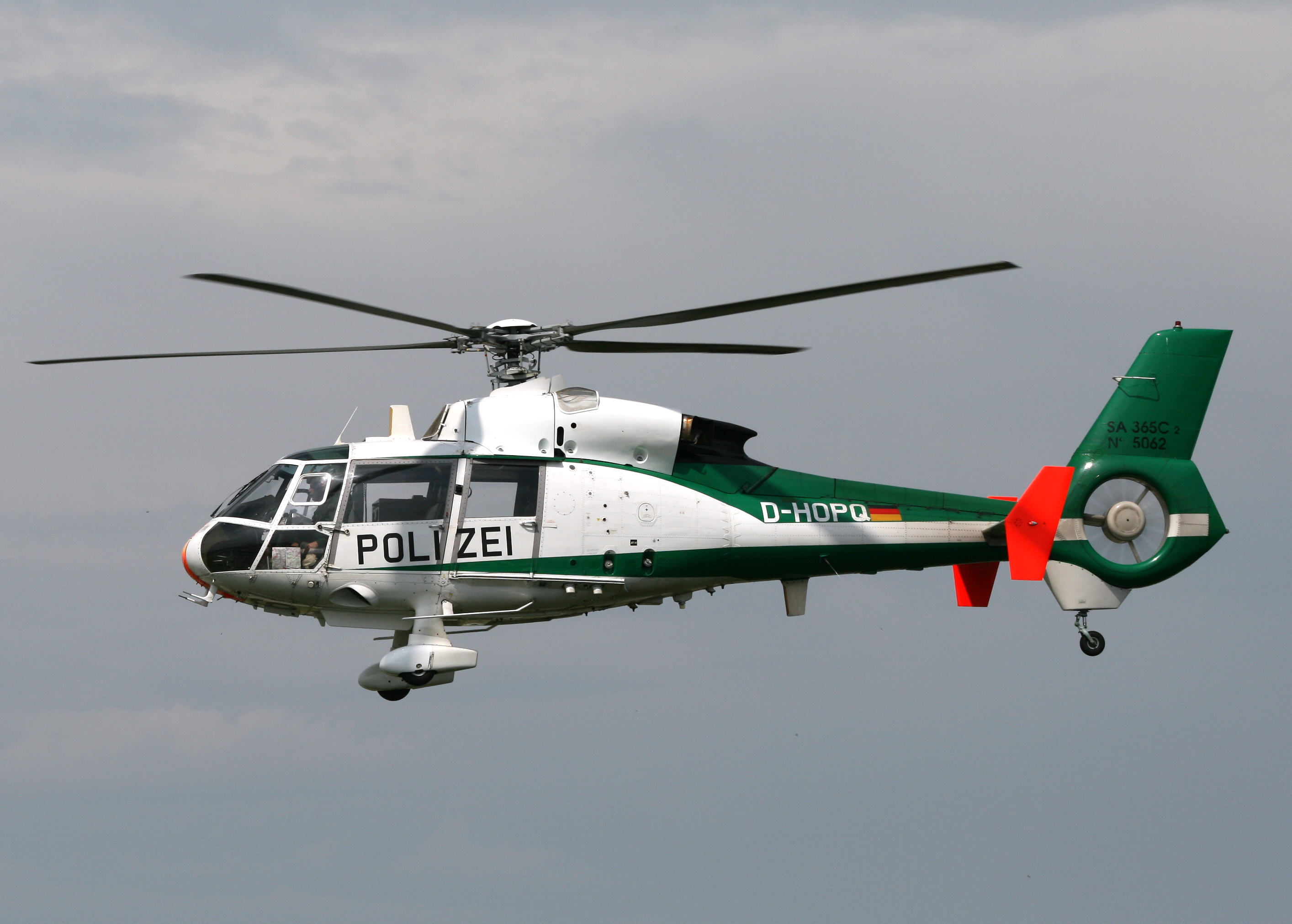 Haj / Eddv 01-08-08